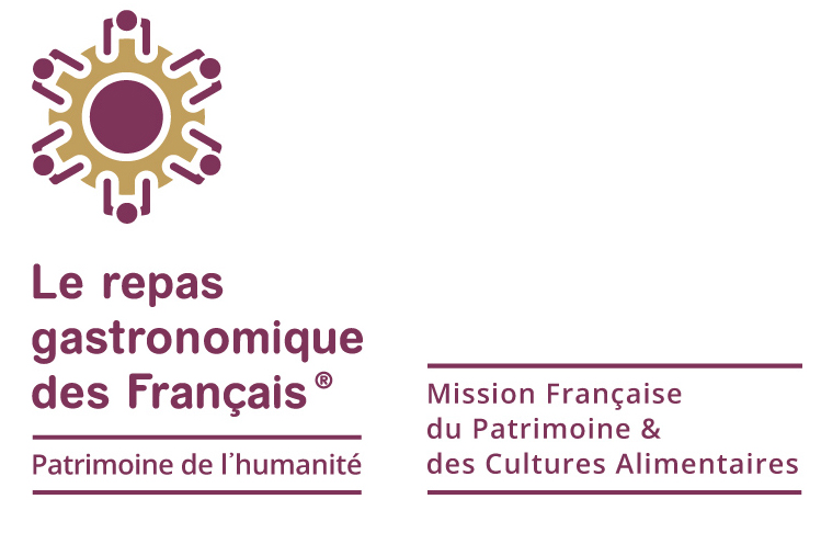 Logo : Repas Gastronomique des Français, Patrimoine de l'humanité